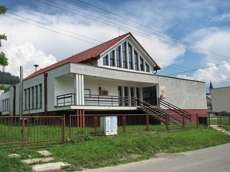 zastranie